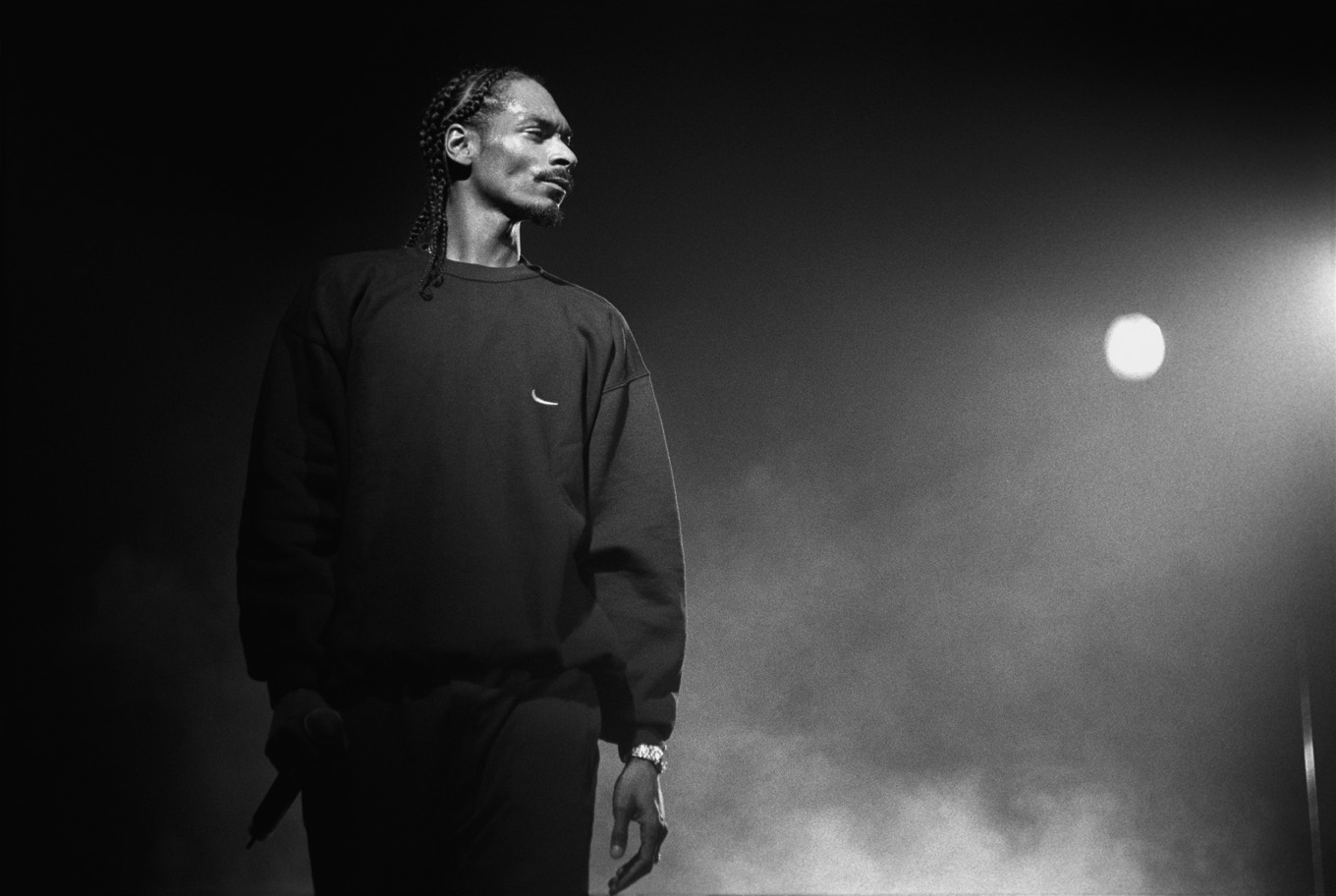 Snoop Dog